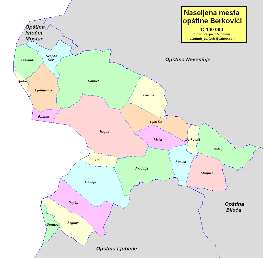 Opština Berkovići